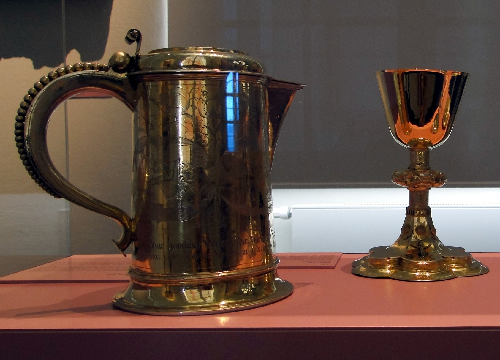 Kelch und Kanne aus der alten Frauenkirche in Dresden